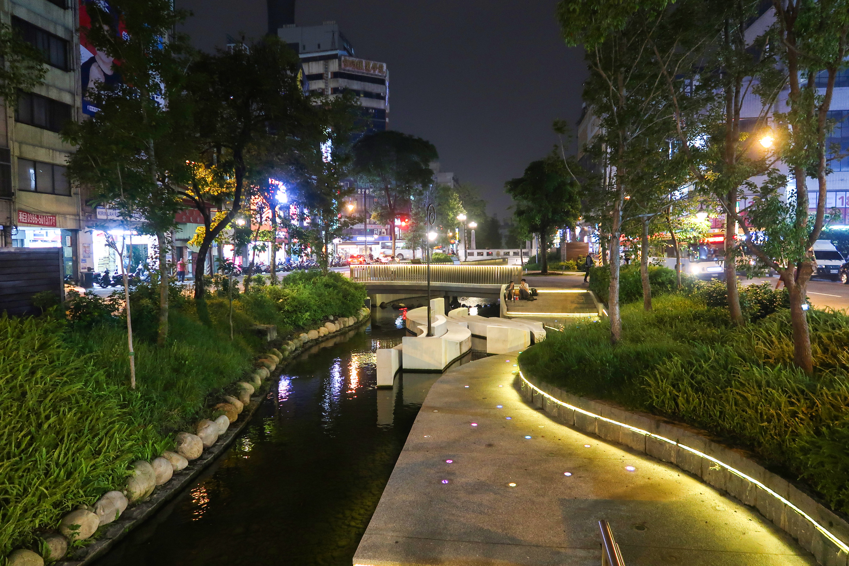 Luchuan Canal (Taichung) night view